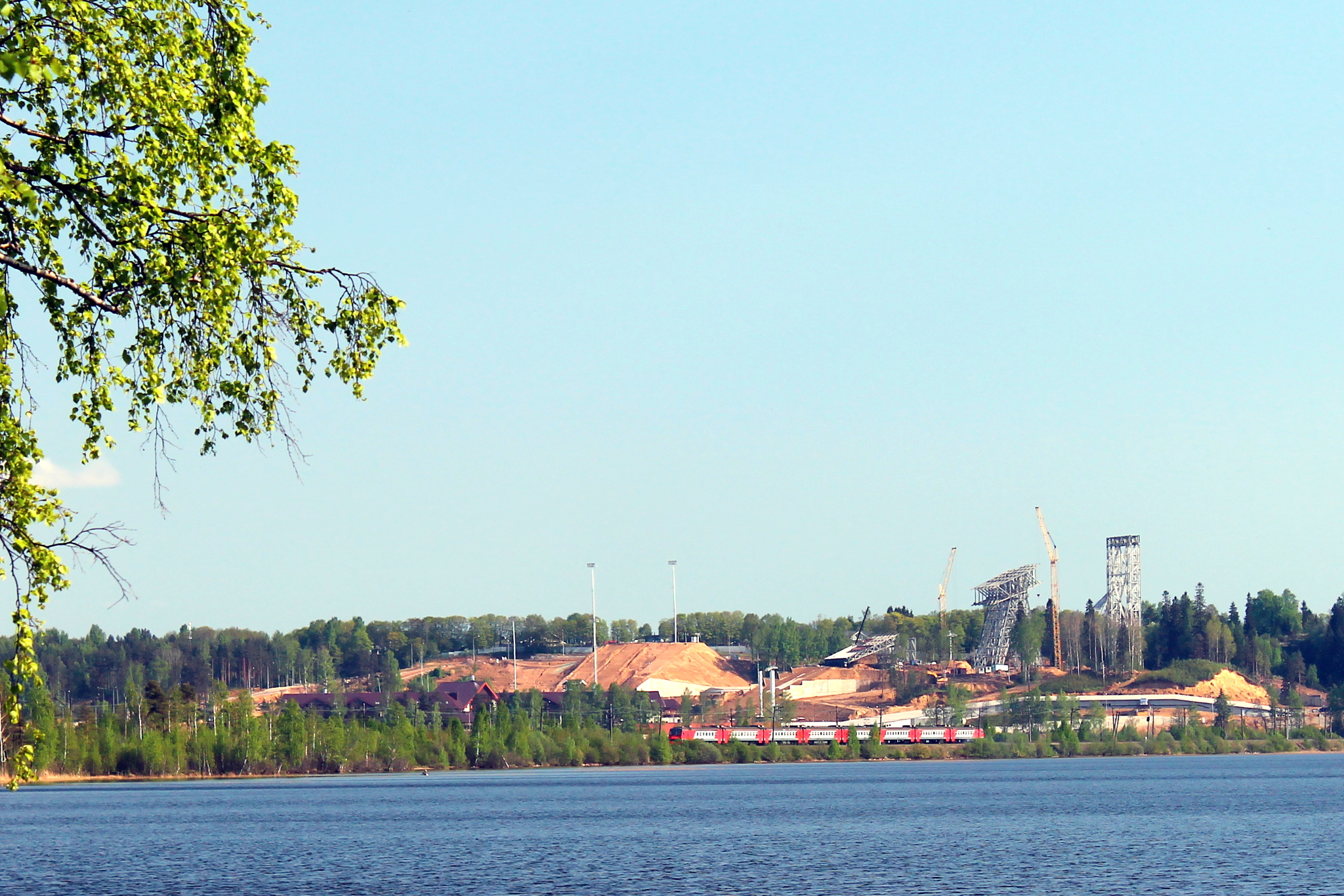 ЭД4М на Санкт-Петербург, перешеек Папинтайпале, Кавголовское озеро и строительство спорткомплекса. см. фото 504067 в альбоме автора